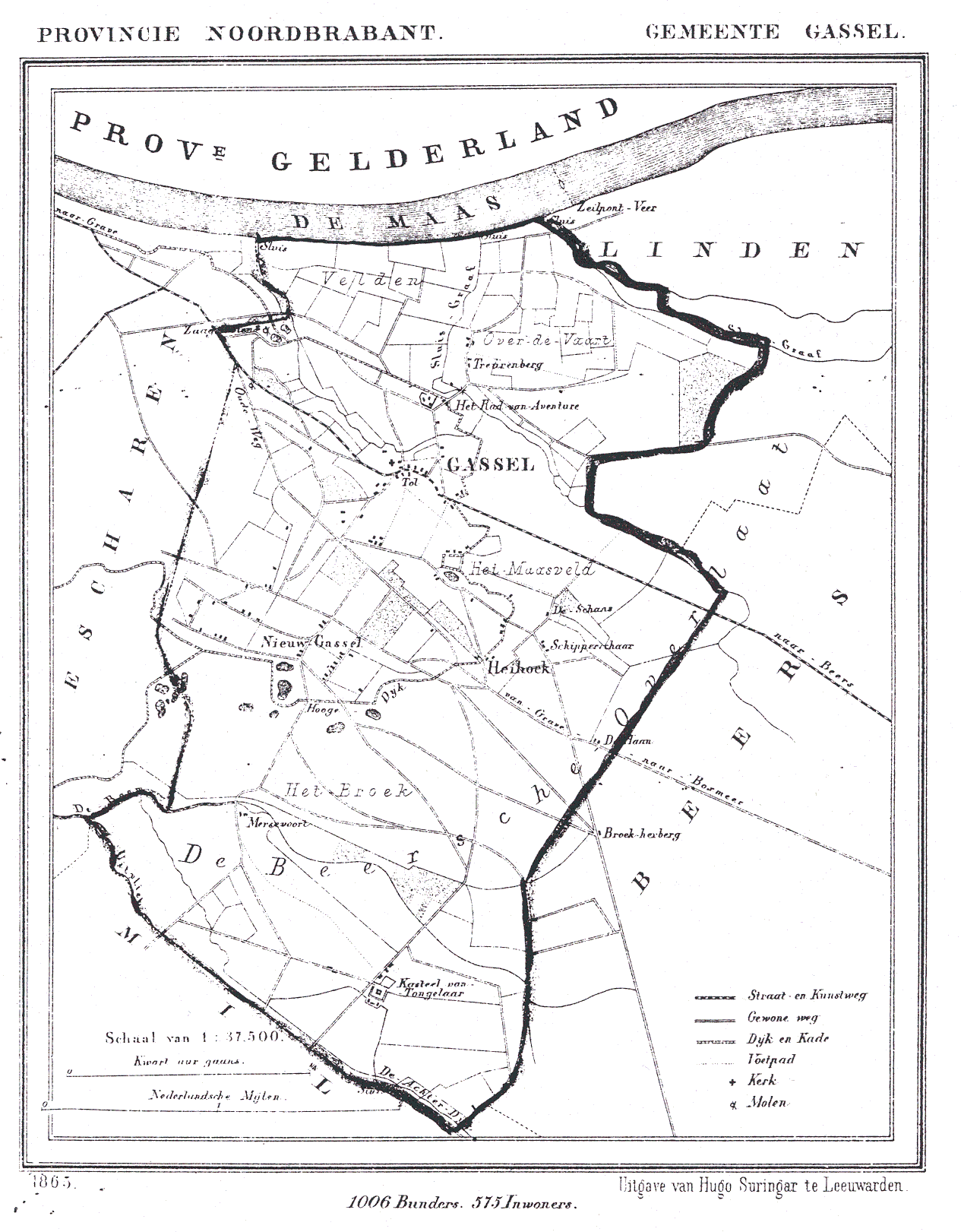 Nederland, Noord-Brabant, Gemeente Gassel